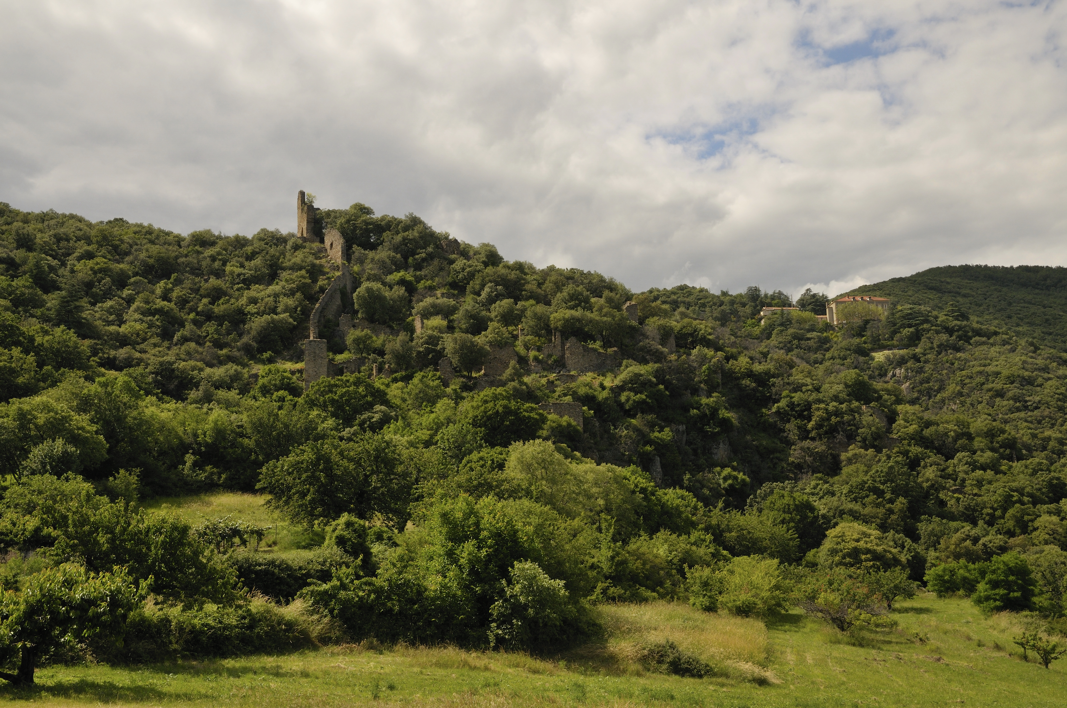 ruines du village de st Marcel et maison de convalescence